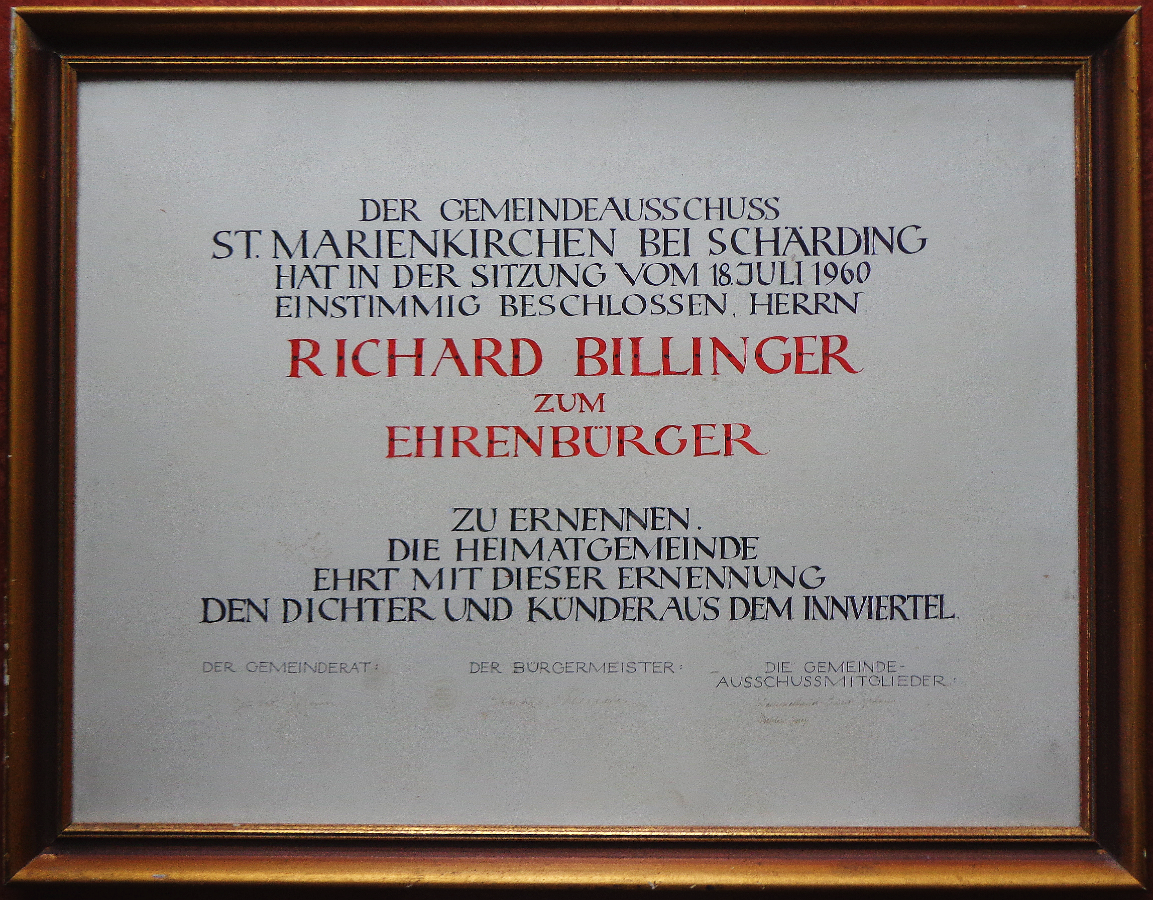 Ehrenbürgerurkunde der Gemeinde St. Marienkirchen bei Schärding für Richard Billinger (1960), geschaffen von Pater Emmerich Doninger (1914–1964).